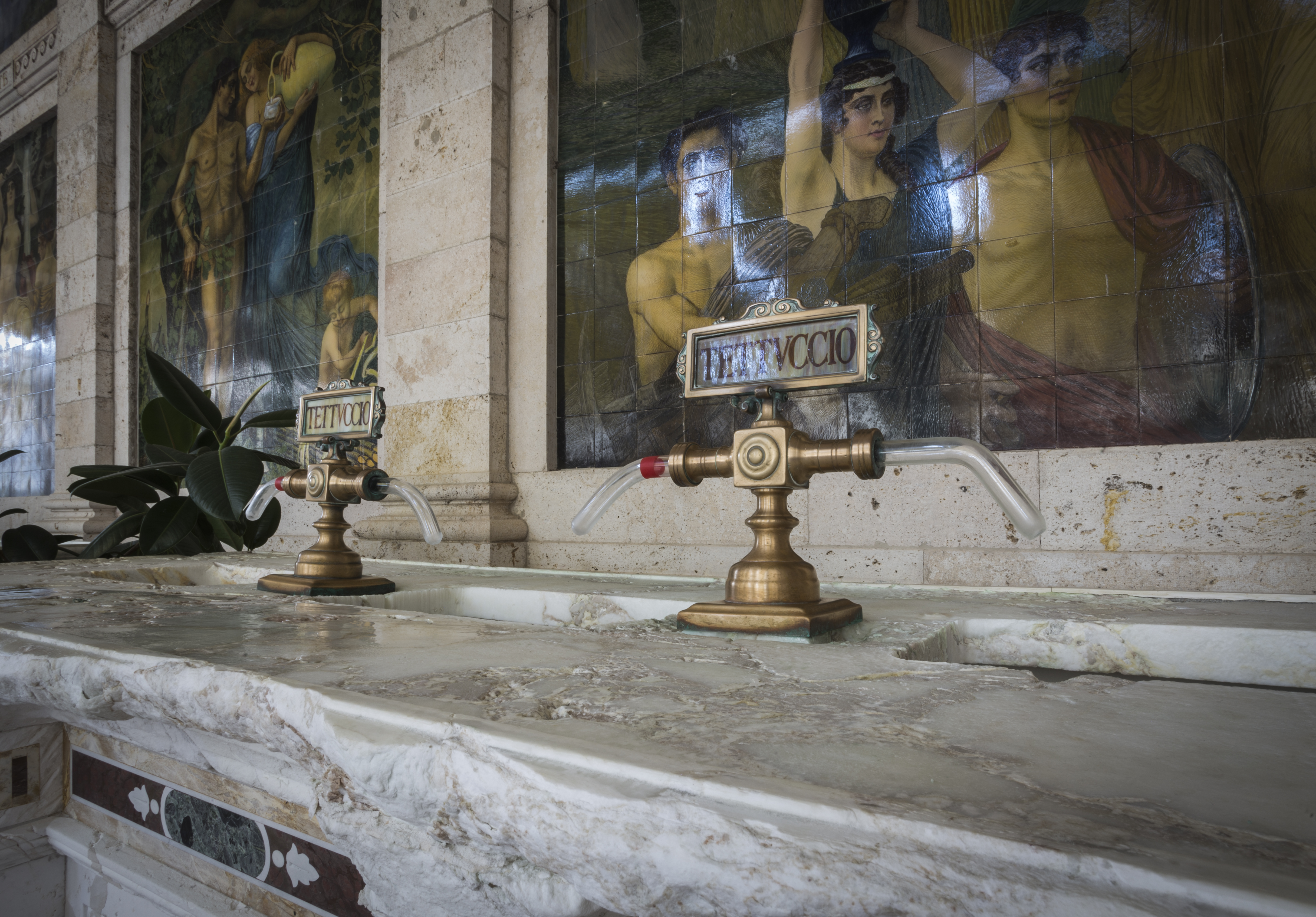 Terme Tettuccio This is a photo of a monument which is part of cultural heritage of Italy.